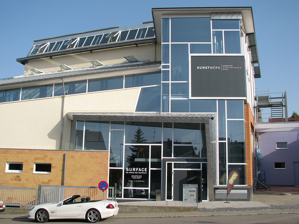 Kunstwerk, Museum der Sammlung Alison & Peter W. Klein